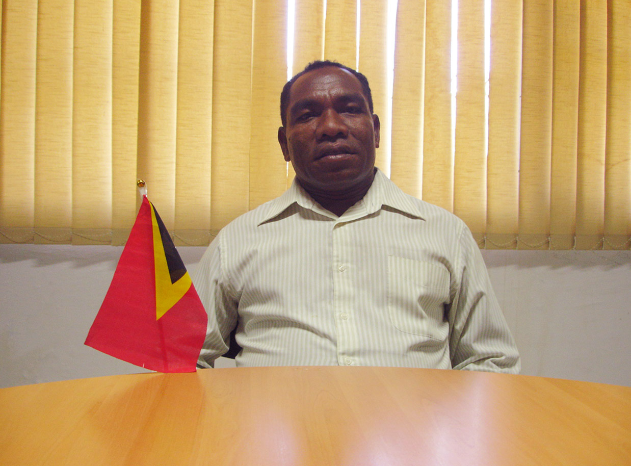 Manuel Ramos Pinto, Administrator der Gemeinde Ainaro